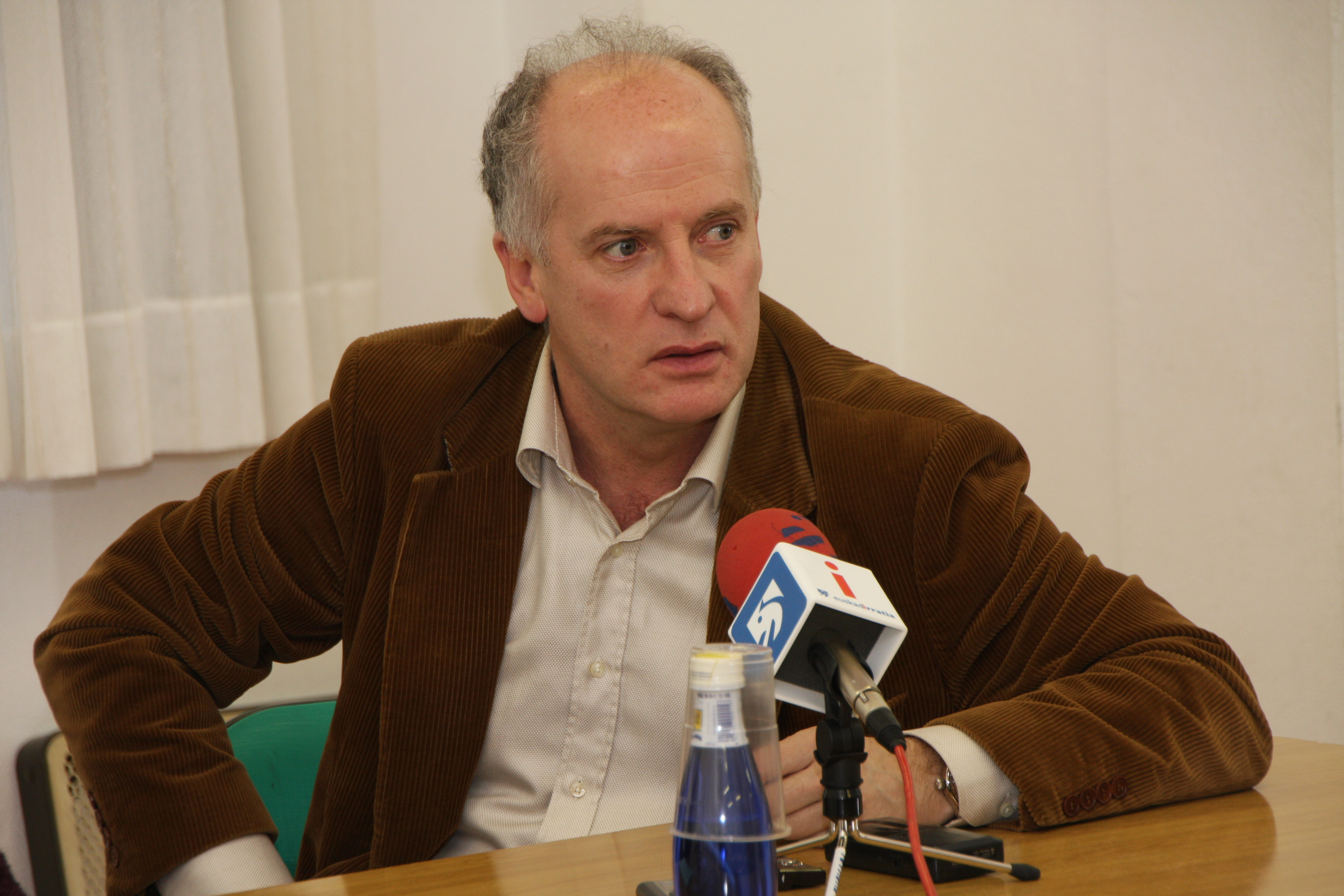 Guardia Zibilaren eskuetan egondako egunetan jasandako torturengatik aurkeztutako salaketa aurkeztu zuen, 2010eko martxoaren 18an, Algortako Aldai patronatuan, Marimertxe Alcocerrek, Iñaki Zarraoa Getxoko alkate ohia eta Martxelo Otamendirekin batera.